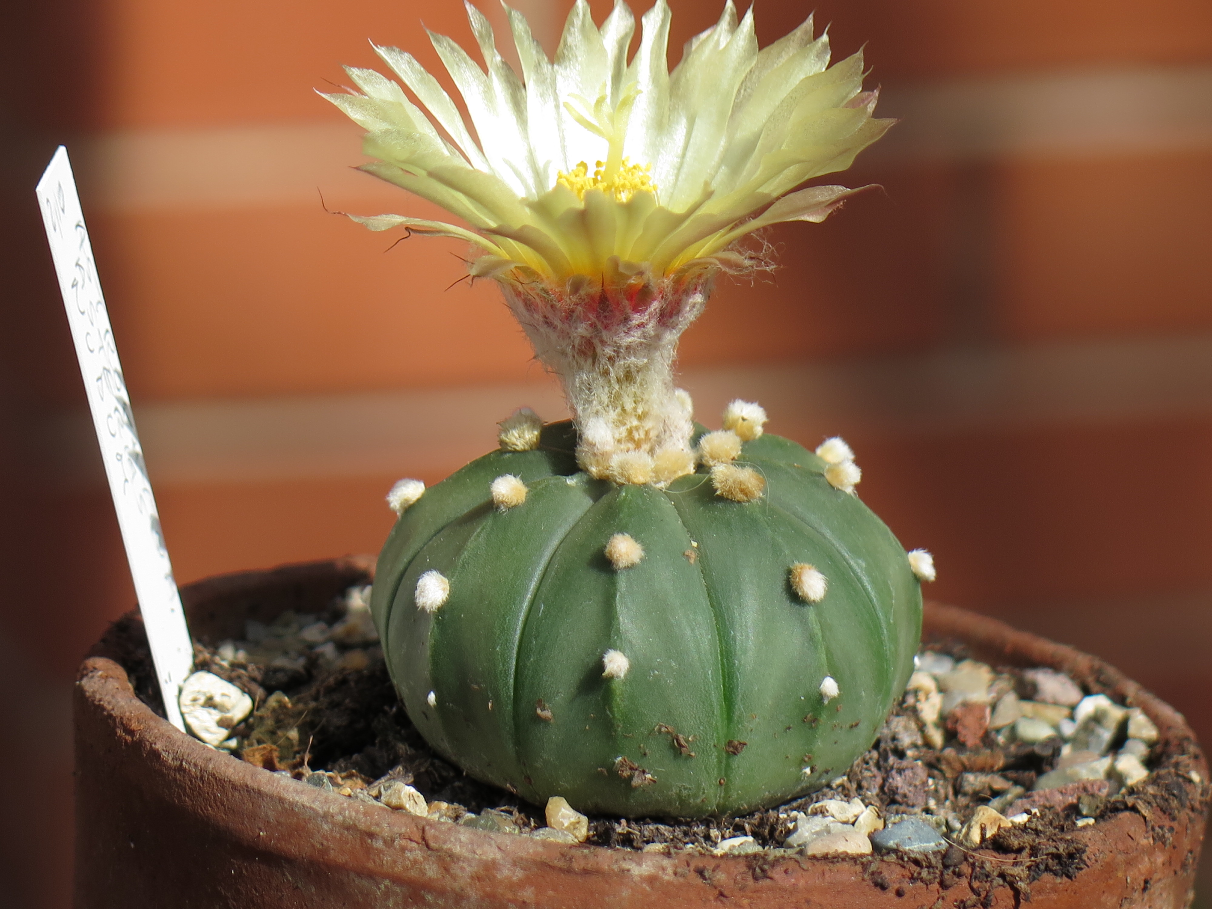 Astrophytum asterias cv. nudum in fiore